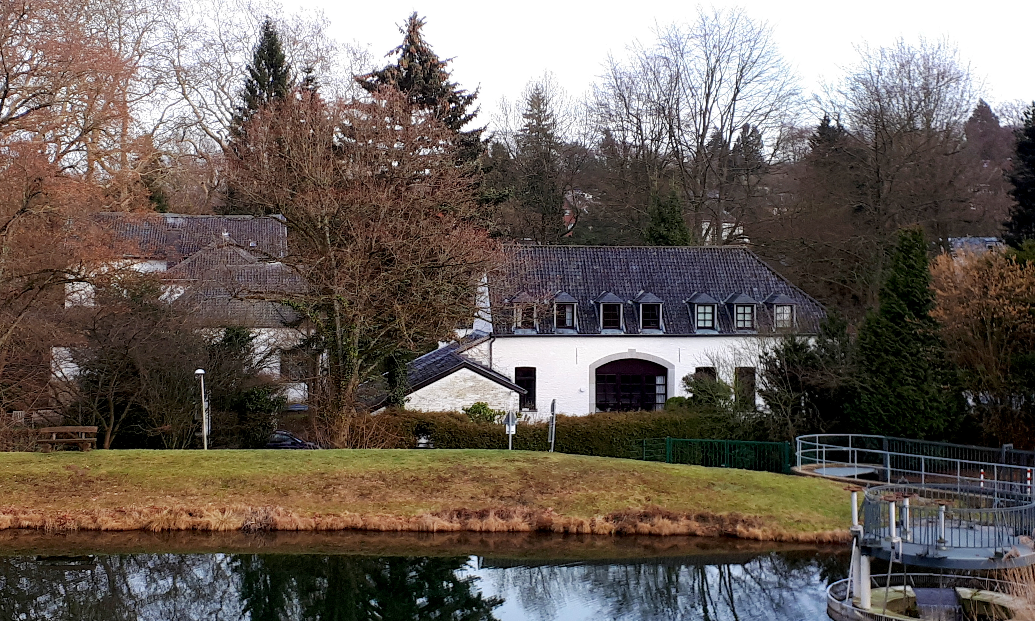 Gut Diepenbenden - Aachen; Baudenkmal in Aache-Mitte; Geburtshaus von Alfred Rethel; Landgut, Mühlenbetrieb; Fabrikstätte für Salmiak und Berliner Blau; Erstbau um 161; Neubau um 1820